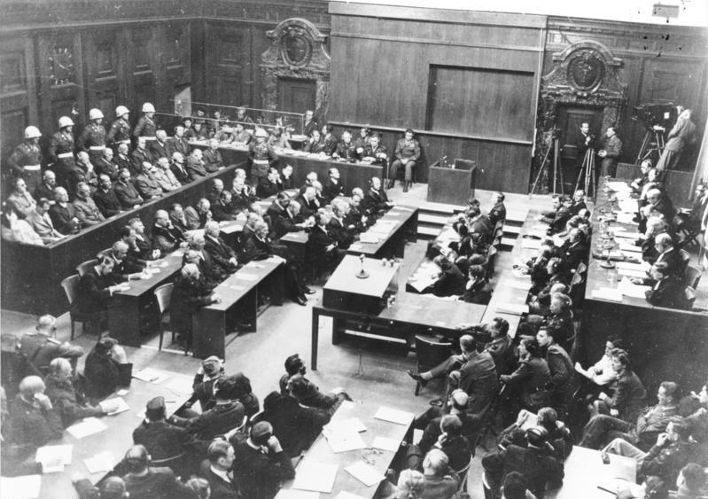 ADN-ZB Strafprozess vor dem Internationalen Militärgerichtshof in Nürnberg 1945/46 gegen führende Personen (Hauptkriegsverbrecher) des faschistischen Deutschlands wegen Kriegsverbrechen, Verbrechen gegen den Frieden und gegen die Menschlichkeit; abgeschlossen durch Urteil vom 30.9/1.10.1946. UBz: Blick in den Verhandlungssaal am 30.9.1946 Links die Angeklagten. 1. Reihe v.l. Göring, Heß, v. Ribbentrop, Keitel, Kaltenbrunner, Rosenberg, Frank, Frick, Streicher, Funk, Schacht. 2. Reihe: Raeder, v. Schirach, Sauckel, Jodl, v. Papen, Seyß-Inquart, Speer, v. Neurath, Fritsche.